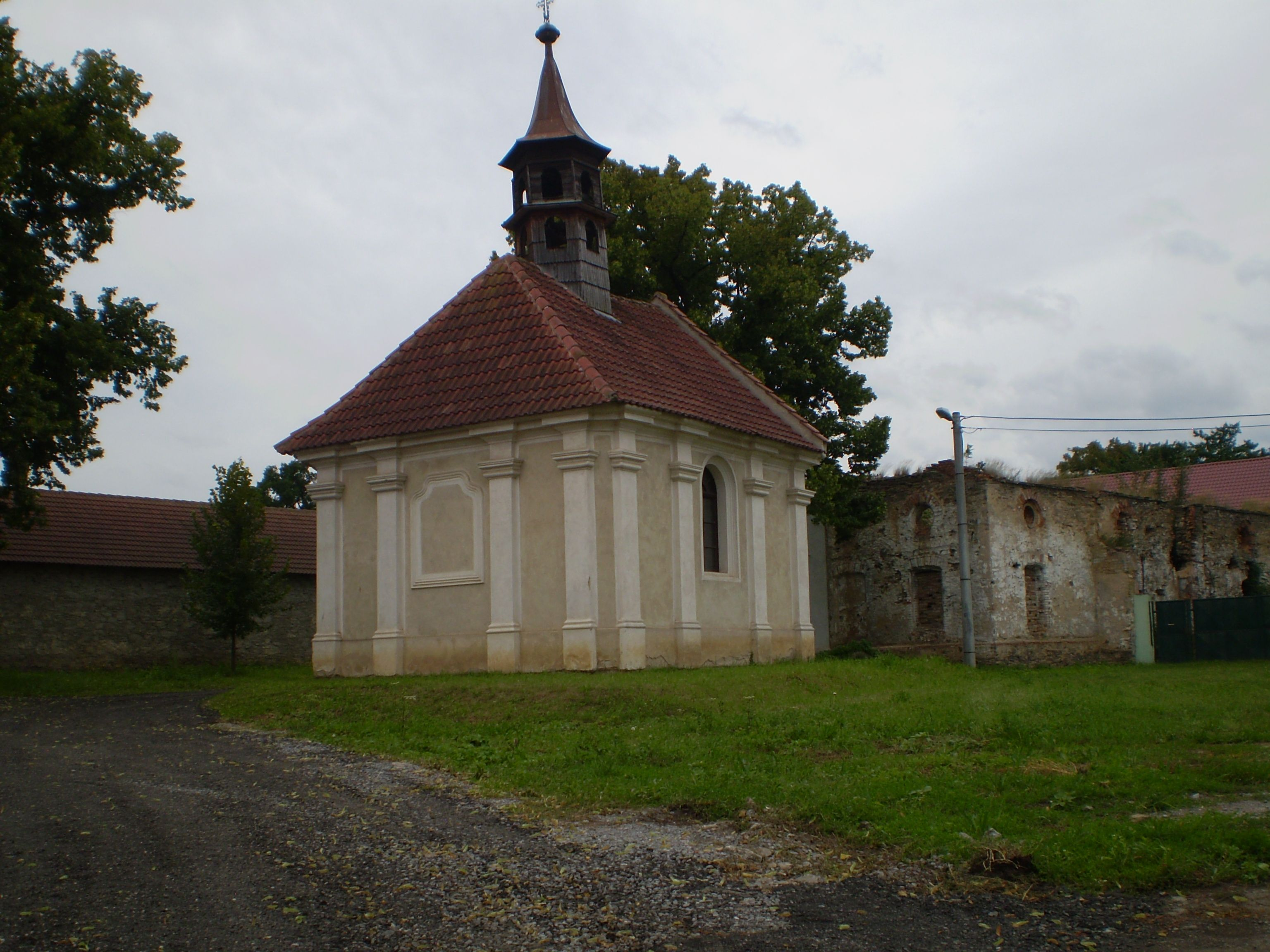 Kaplička sv. Gottharda Poboří